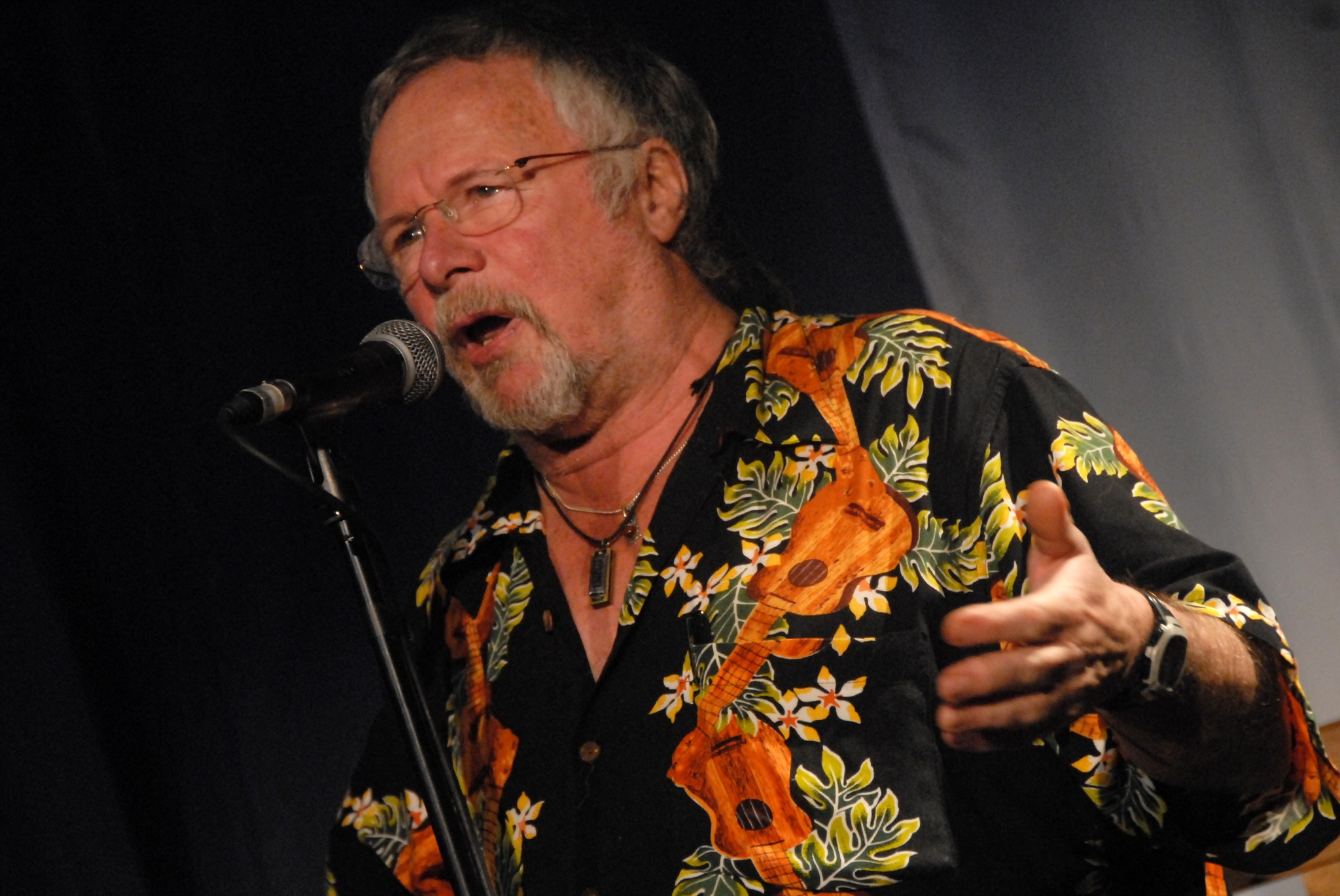 Bill Oddie